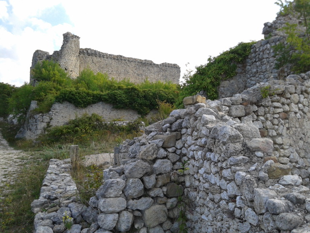 Ruderi del borgo antico intorno al castello Orsini